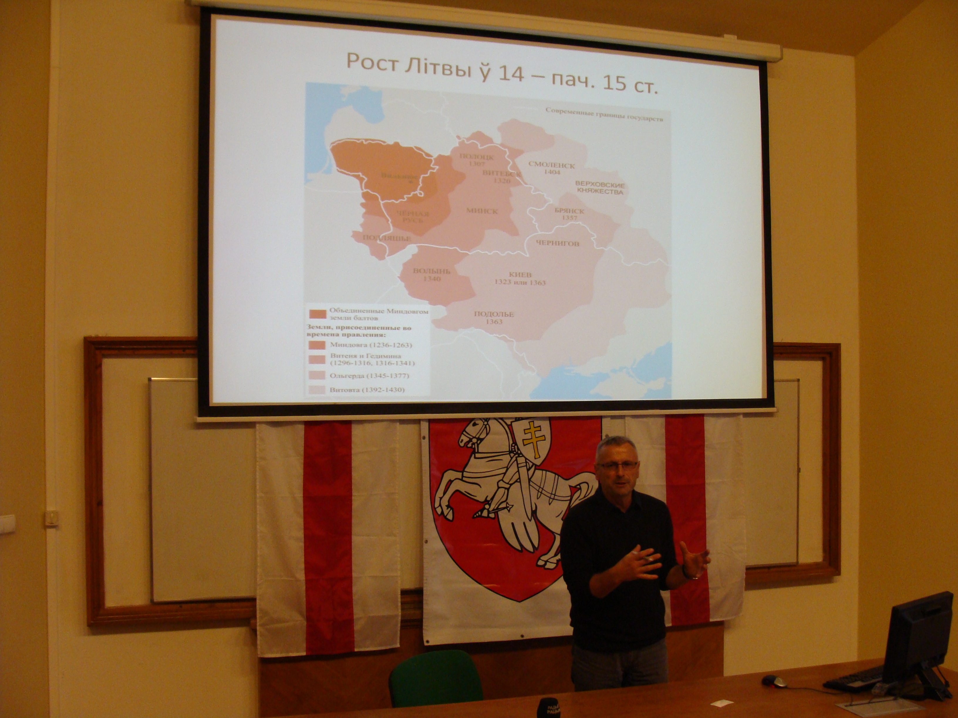 Profesor dr hab. Alaksandr Kraucewicz opowiada o początkach Wielkiego Księstwa Litewskiego podczas prezentacji jego książki "Historyja Wialikaha kniastwa Litouskaha" na uniwersytecie Collegium Civitas w Warszawie.